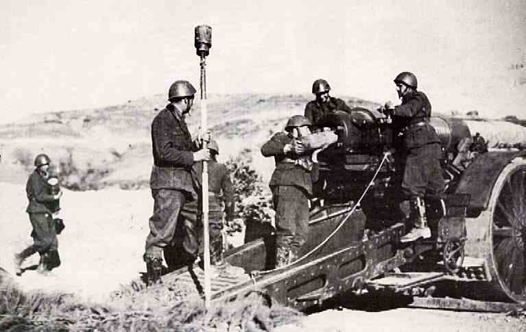 152/37 in batteria - caricamento